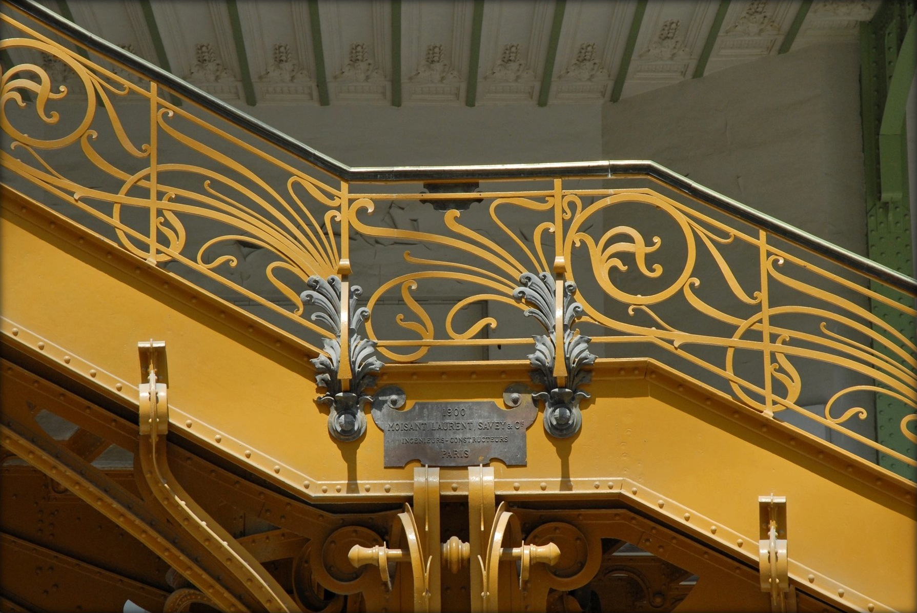 Détail de l'escalier d'honneur art nouveau du Grand Palais